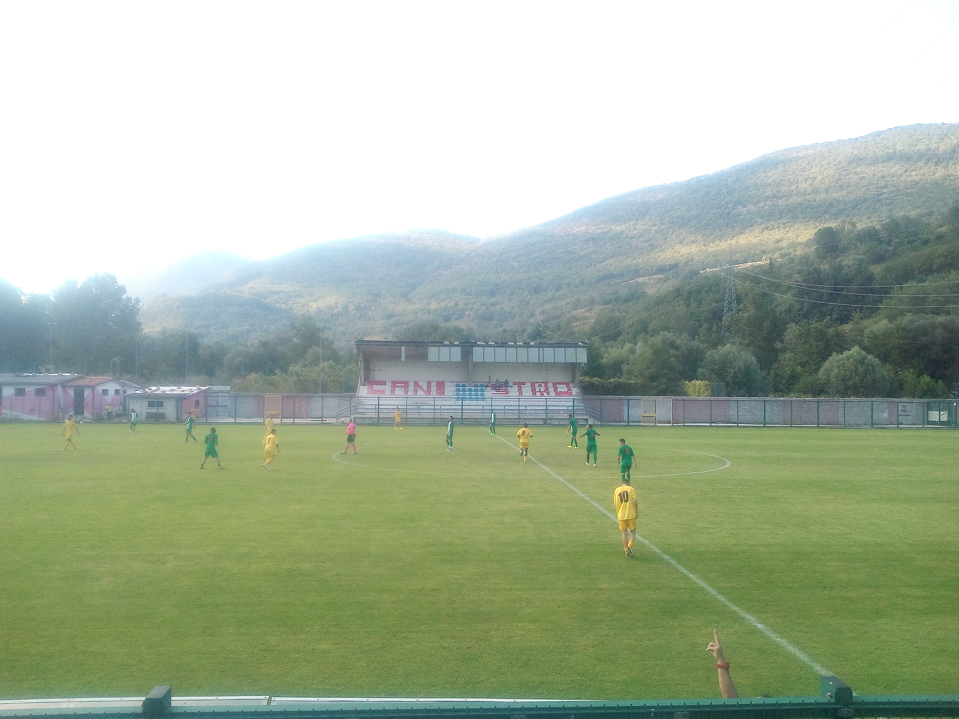 Amichevole Avezzano-Pucetta allo stadio comunale di Canistro